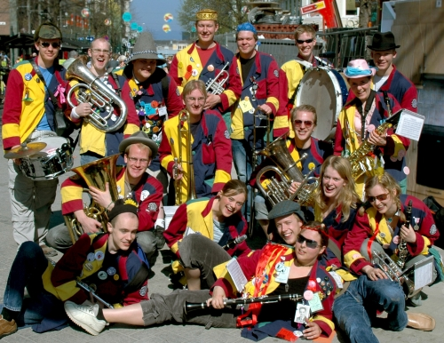 Studentorchesteret Dei Taktlause: Bildet viser hele orchesteret oppstilt på Nordre Gate i Trondheim etter å ha underholdt byens befolkning. Bilde tatt av Jon Martin Harstad Bakken, mai 2006